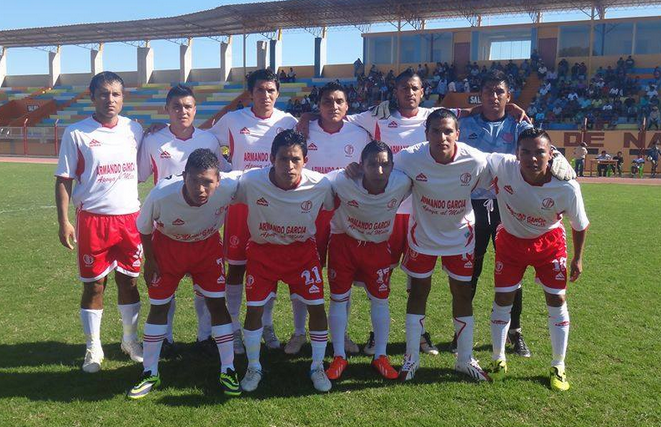 Equipo del Juan Mata que participo en la edición de la etapa provincial de Nasca 2014.